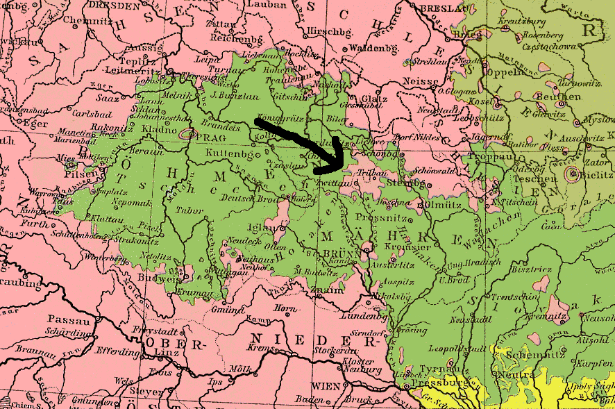 Hřebečsko znázorněné na mapě k roku 1880